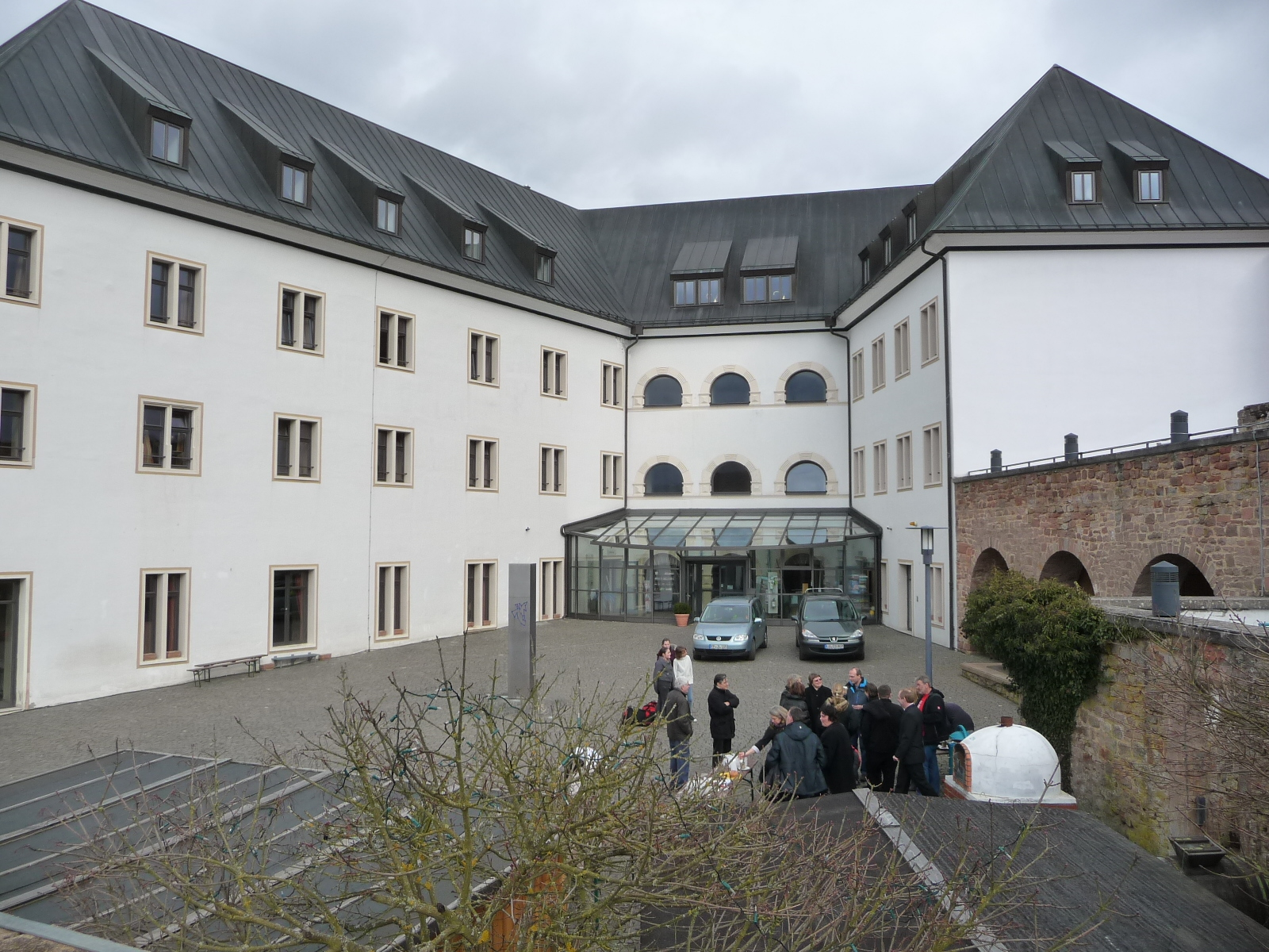 Burg Altleiningen